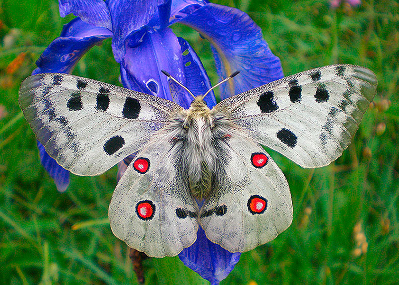 Parnassius apollo. Presa al Pirineru andorrà.